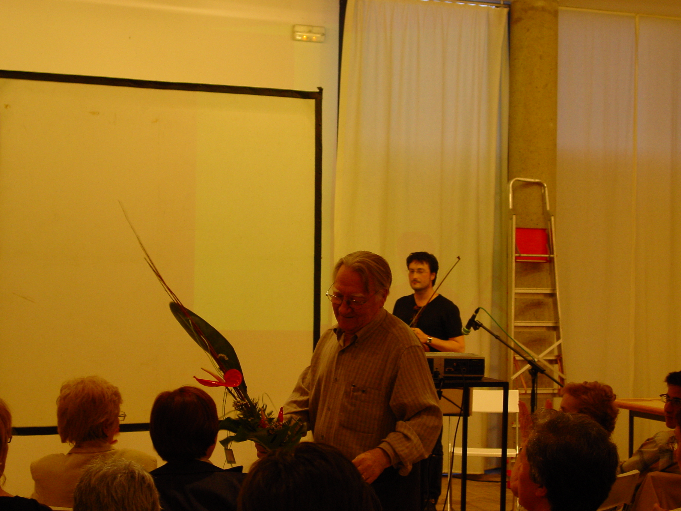 Màrius Sampere Còdols 2007